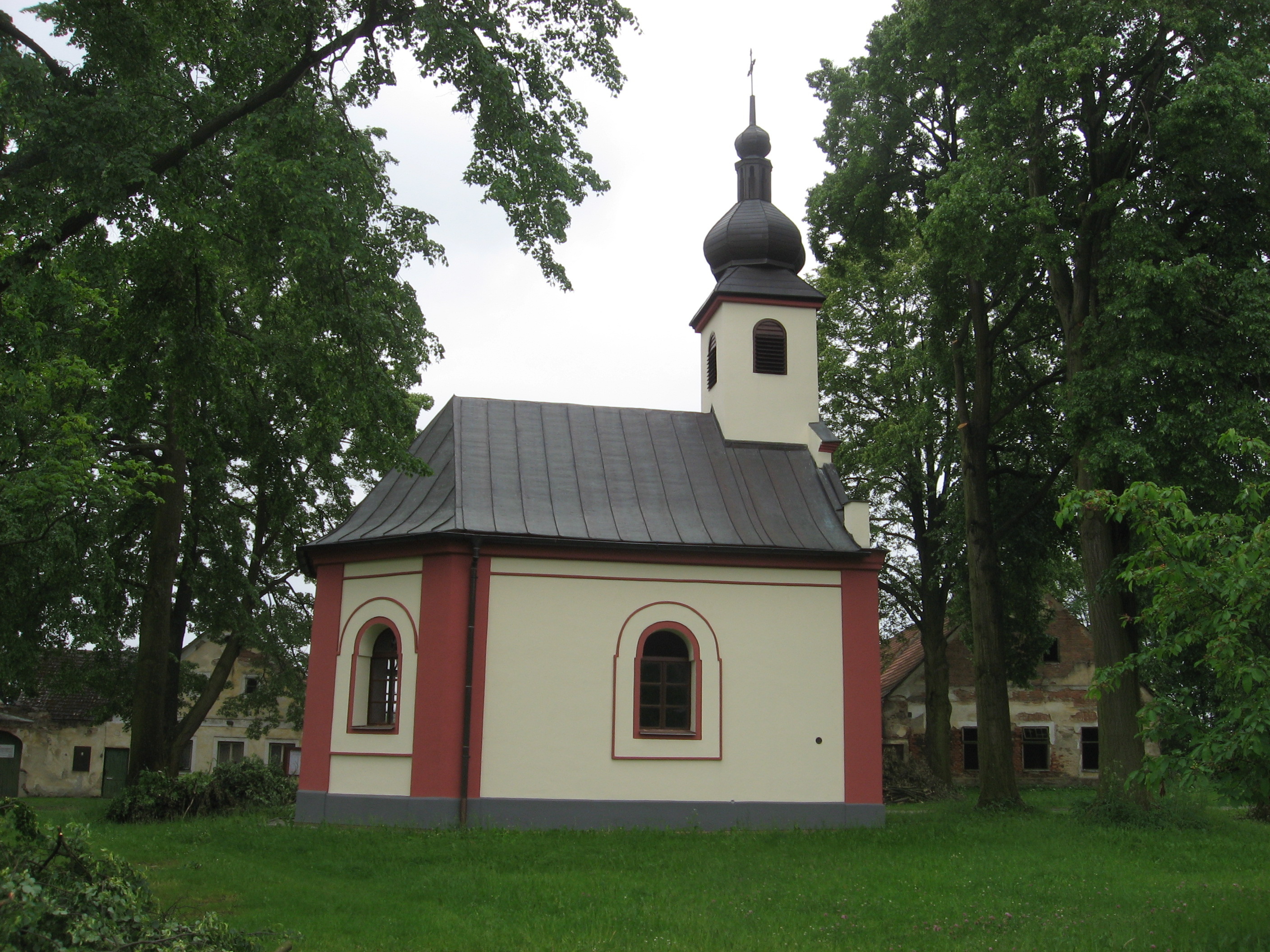 Kaple svatého Jana Nepomuckého, náves, Matná.